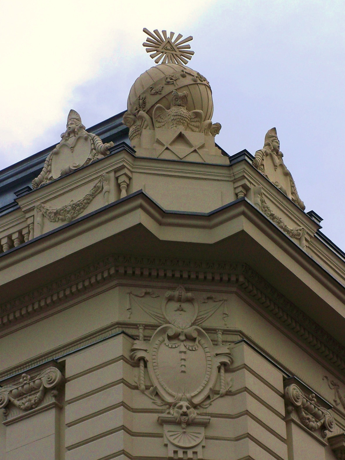 egykori Magyarországi Symbolikus Nagypáholy (Budapest 6, Podmaniczky Frigyes utca 45.) This is a photo of a monument in Hungary. Identifier: 766